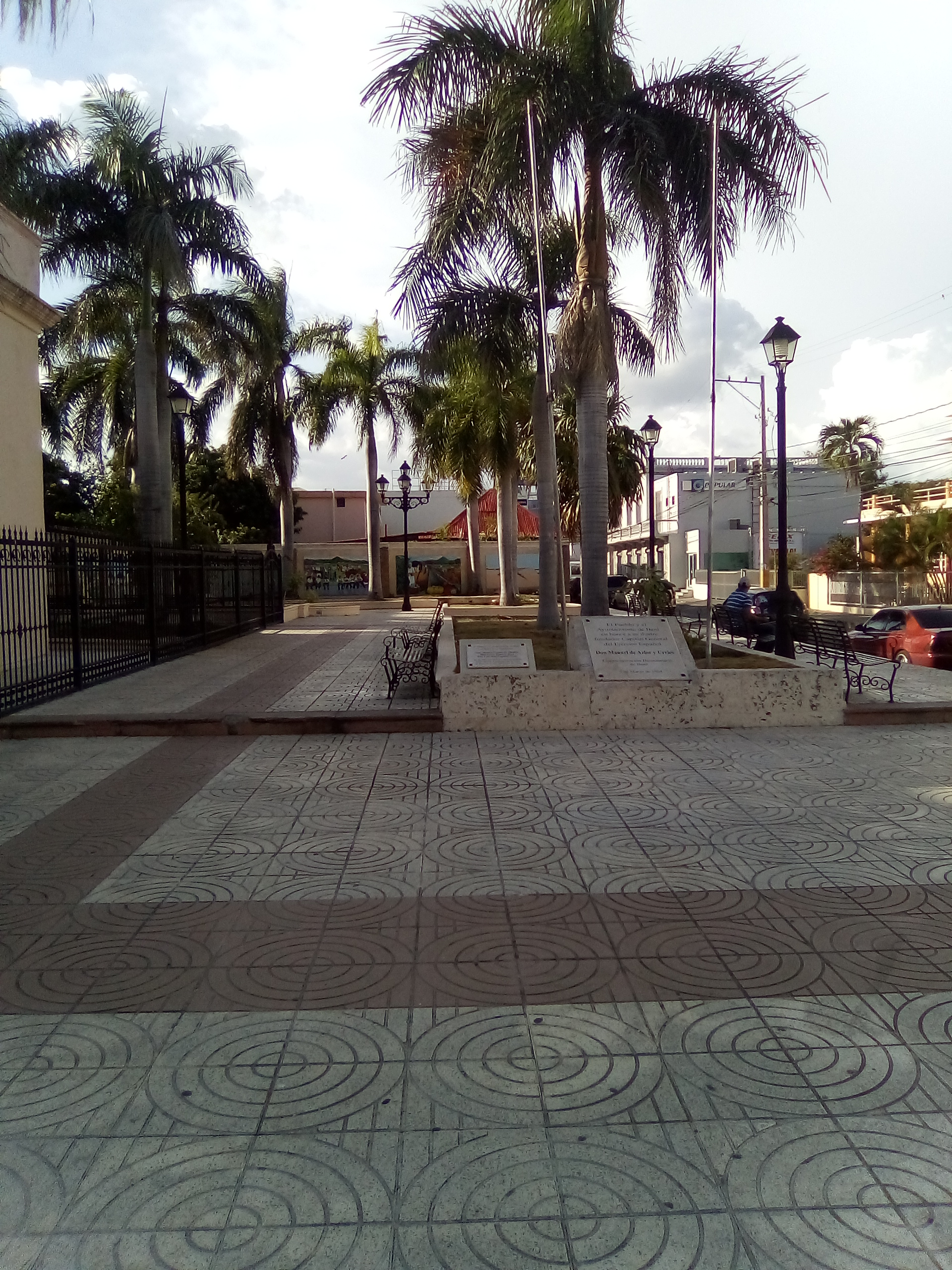 Parque de Los Fundadores